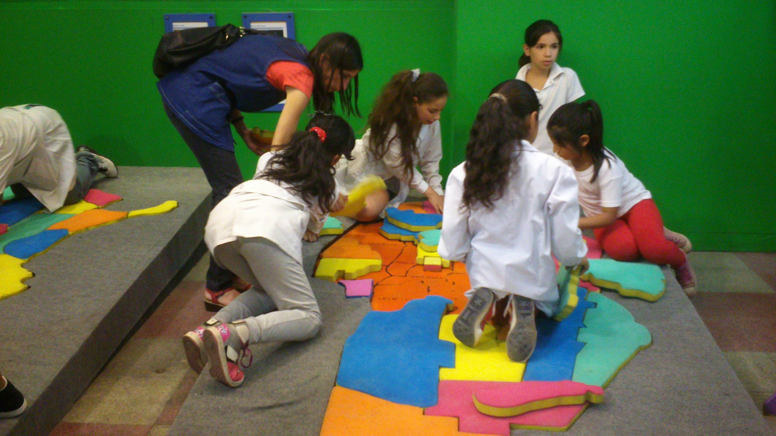 Paseo didáctico al museo de los niños Barrilete con una muestra de Isidro Ferrer basado en el libro de las preguntas de Neruda